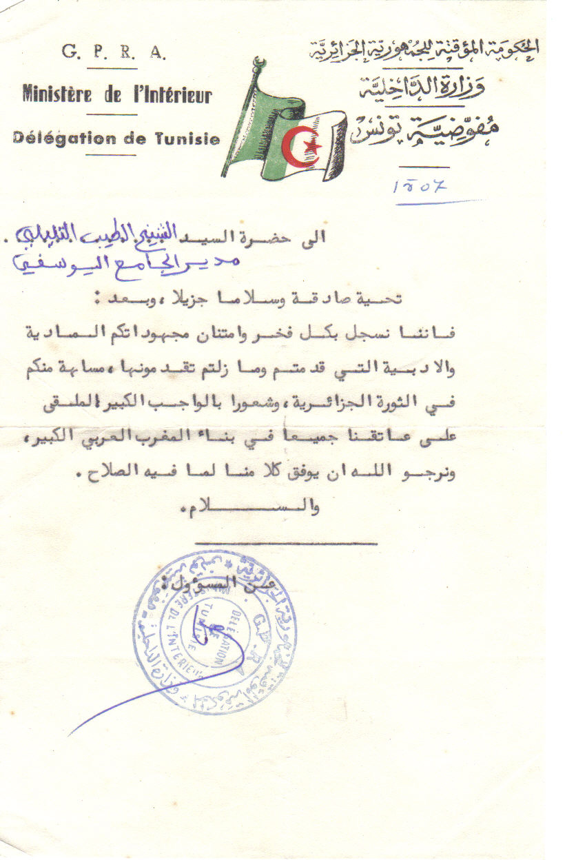 الرسالة الجزائرية إلى الشيخ